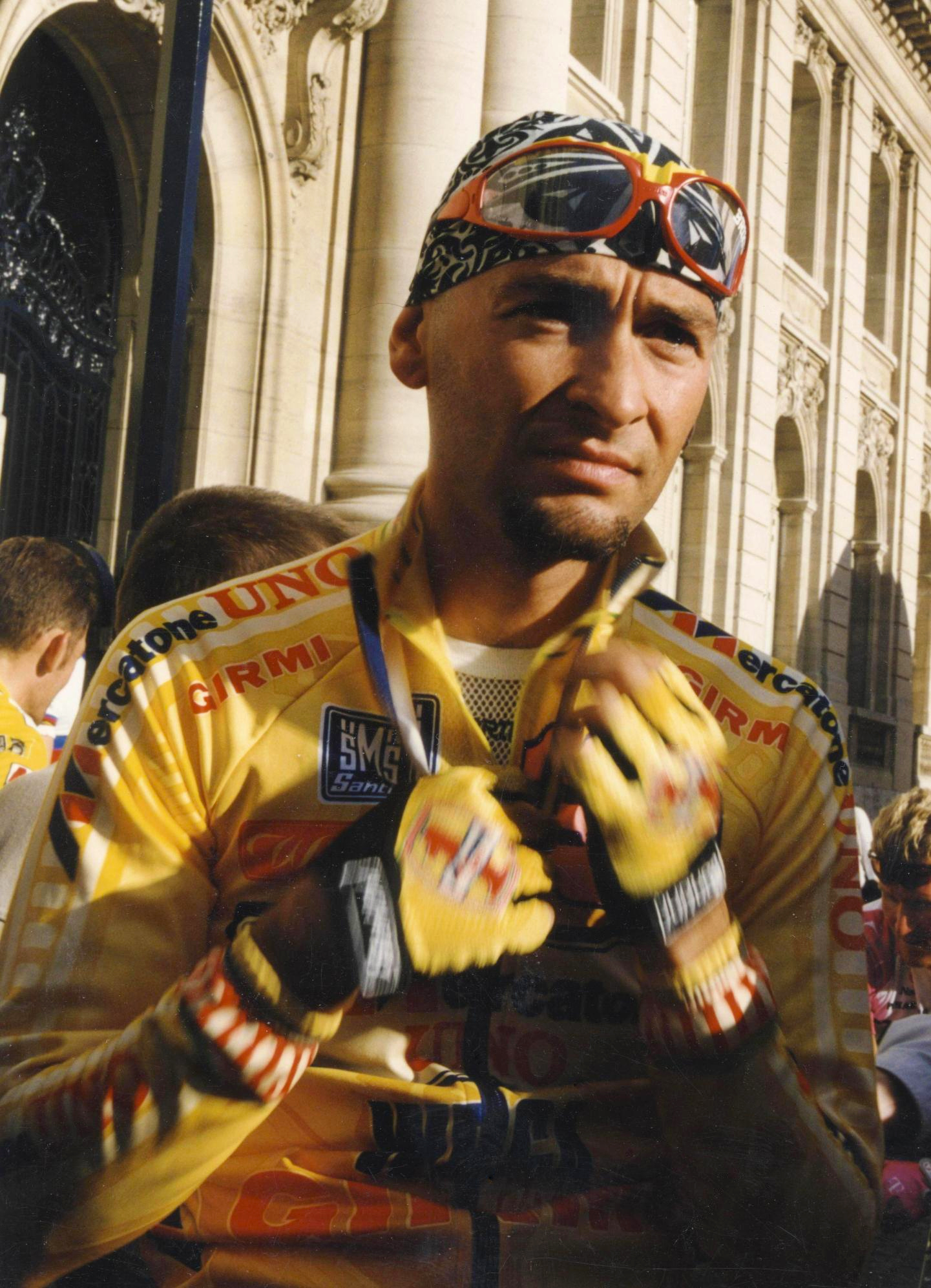 De Marco Pantani 1997 zu Lëtzebuerg.